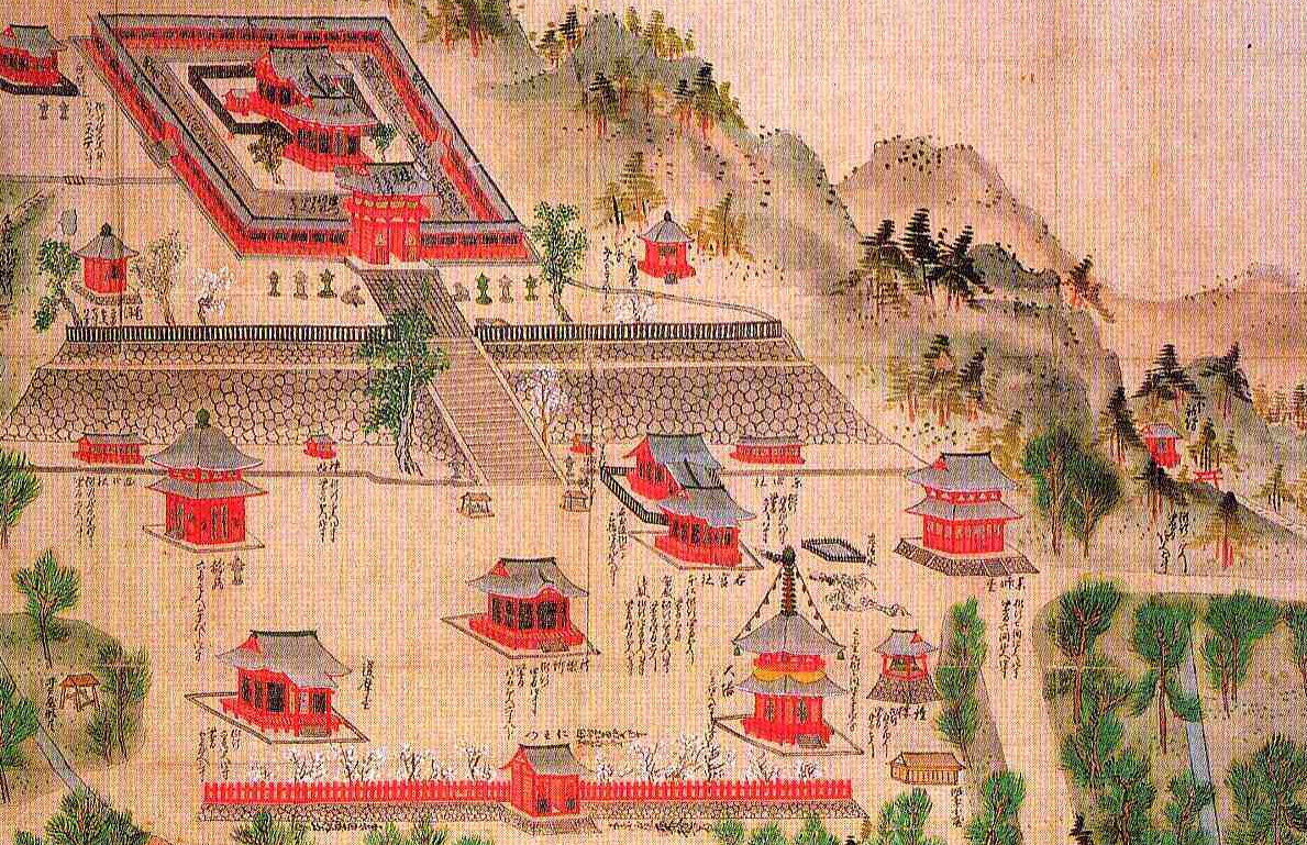 An old drawing of Tsurugaoka Hachiman-gū in Kamakura, Japan, cropped